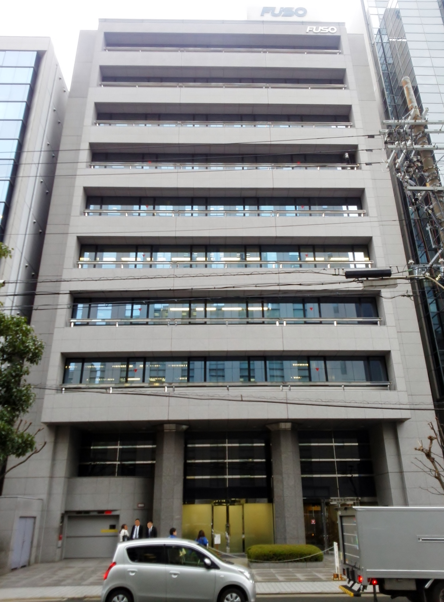 扶桑道修町ビルを撮影。